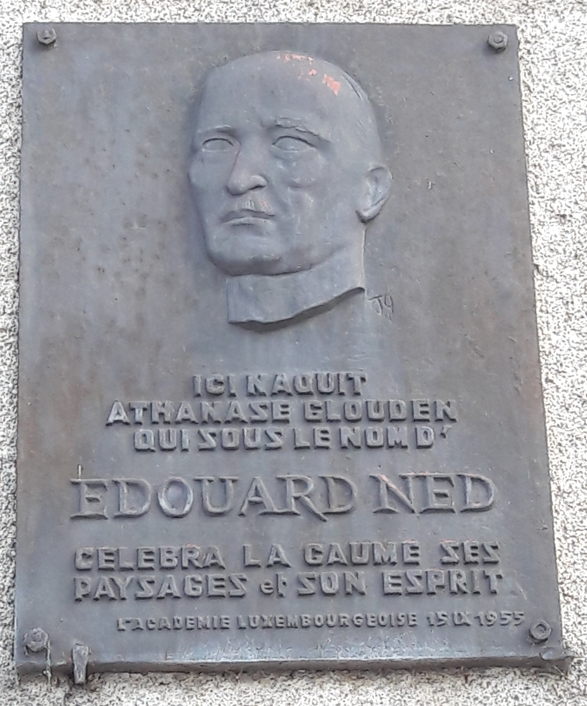 Plaque commémorative sur sa maison natale, à Châtillon